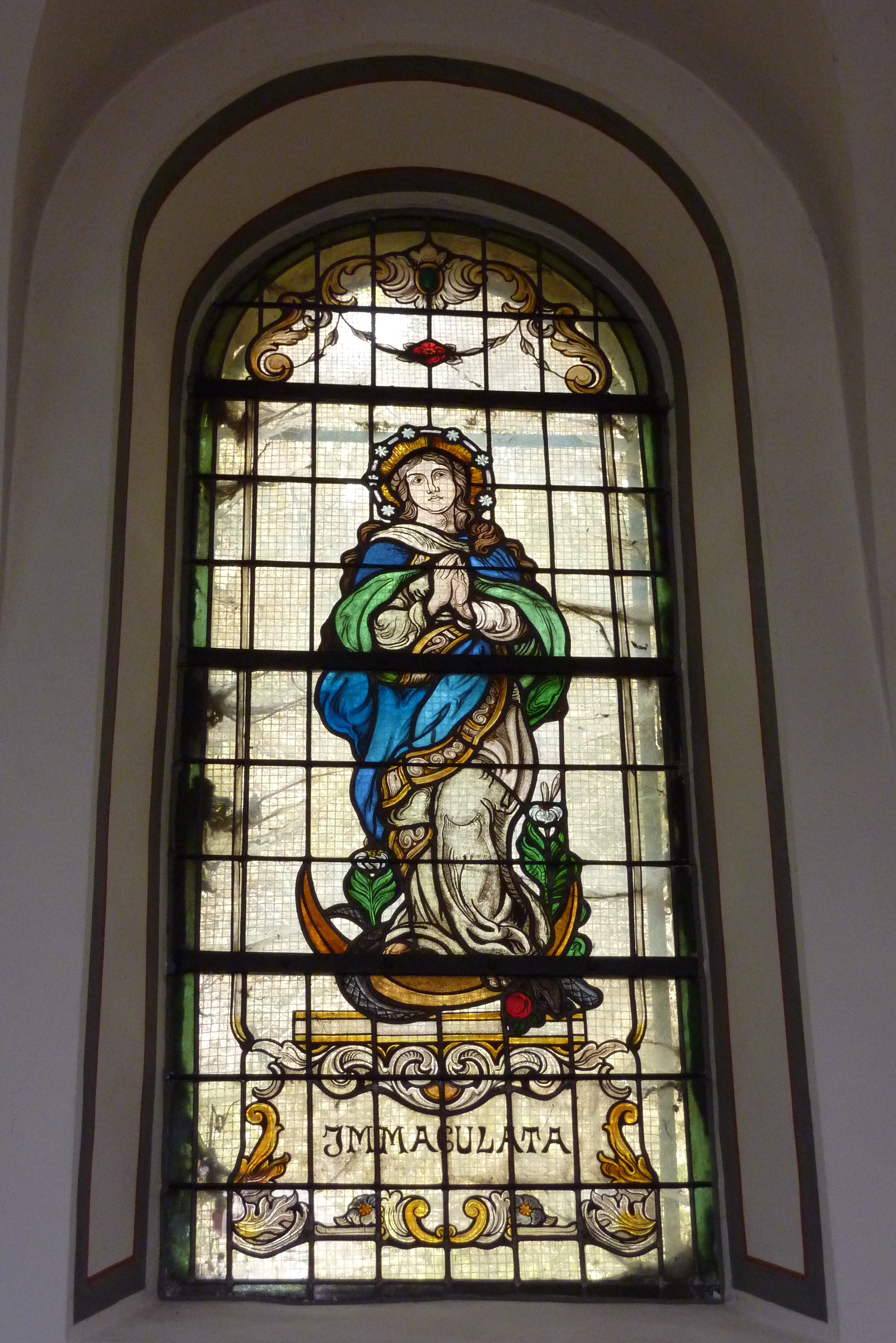 Bleiglasfenster in der katholische Filialkirche St. Simon und Juda in Herschbroich, Darstellung: Madonna auf der Mondsichel